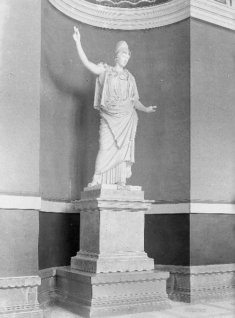 Pallas ou Athena de Velletri (Italie). Copie d'une statue de bronze disparue, de l'ère hellénistique, sculptée sans doute vers 430 av. J.-C. Copie de celle installée au musée du Louvre, elle était installée dans la niche du vestibule du musée bibliothèque de Grenoble ouvert au public en juin 1870. Déplacée en 1923 par le conservateur Andry Farcy dans la chapelle du Lycée Vaucanson où elle demeure encore.